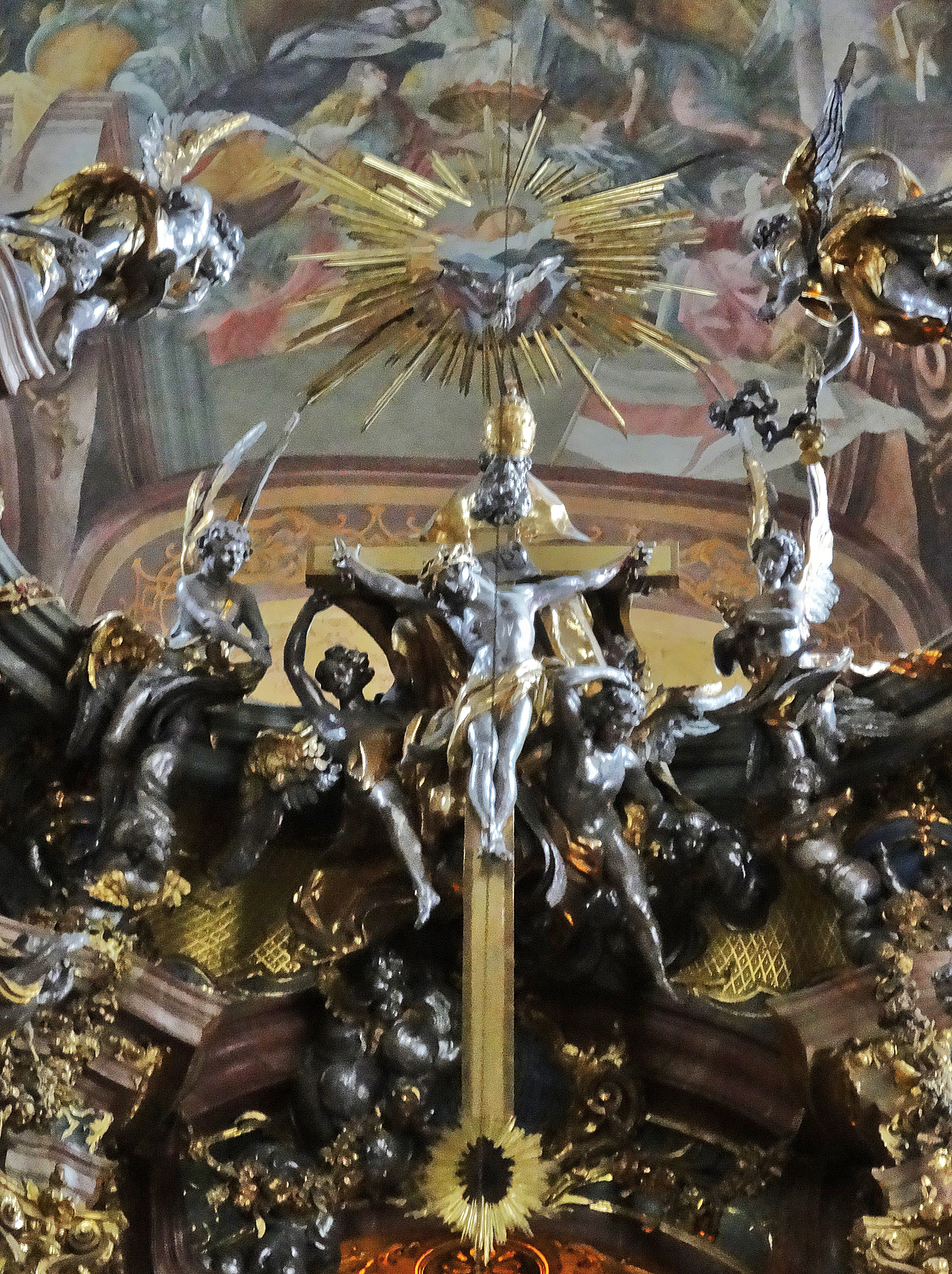 Barocker Gnadenstuhl im Chor der Asamkirche (München)